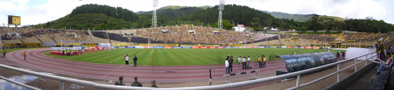 Estadio Polideportivo de Pueblo Nuevo.